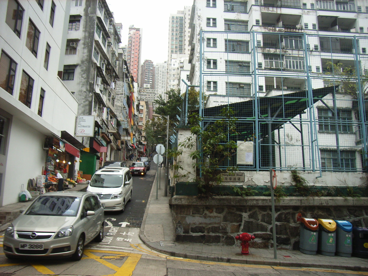 {荷李活}-道警察宿舍是zh:香港一處前已婚高級zh:警察zh:宿舍，位於zh:香港島上環的-{荷李活道}-，正門在其東面的zh:鴨巴甸街35號。 By SHOLYWOD